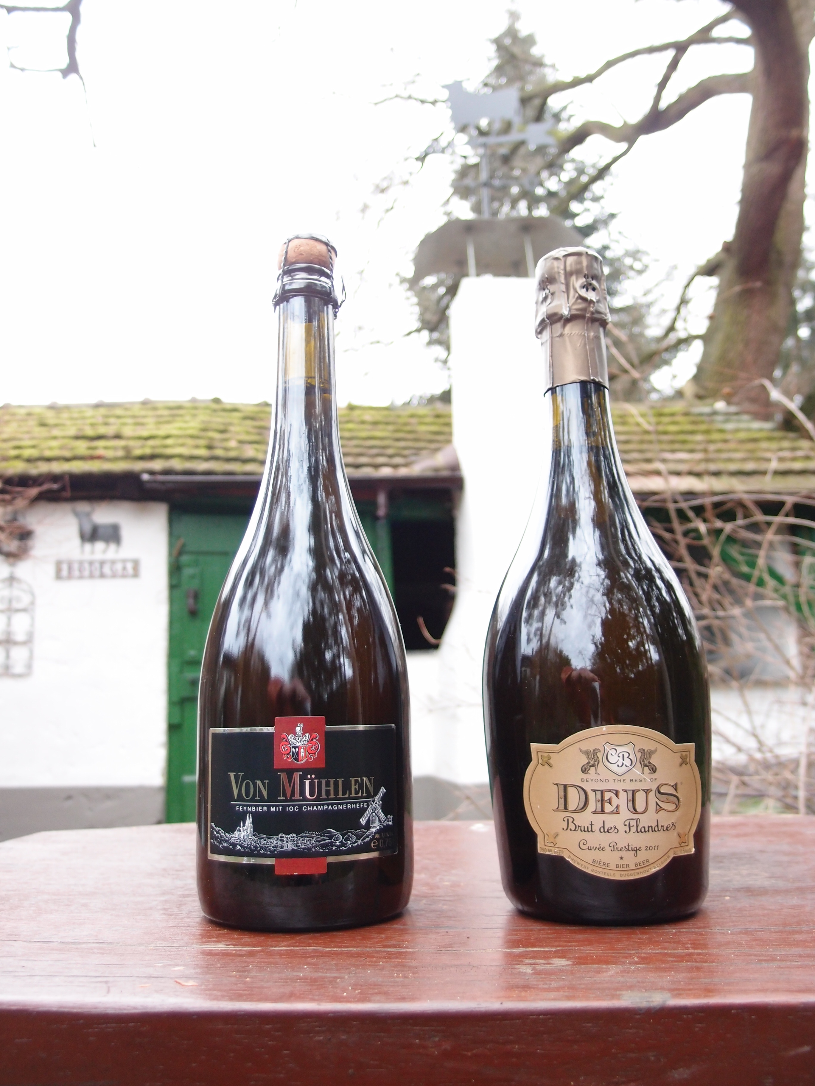 Sogenanntes "Champagner-Bier" ("Von Mühlen", Brauerei zur Malzmühle, Köln; "DeuS", Brauerei Bosteels, Buggenhout) Datum: 25.12.2013 Urheber: M. Pfeiffer alias Benutzer:Gordito1869 Quelle: Privates Fotoarchiv des Urhebers